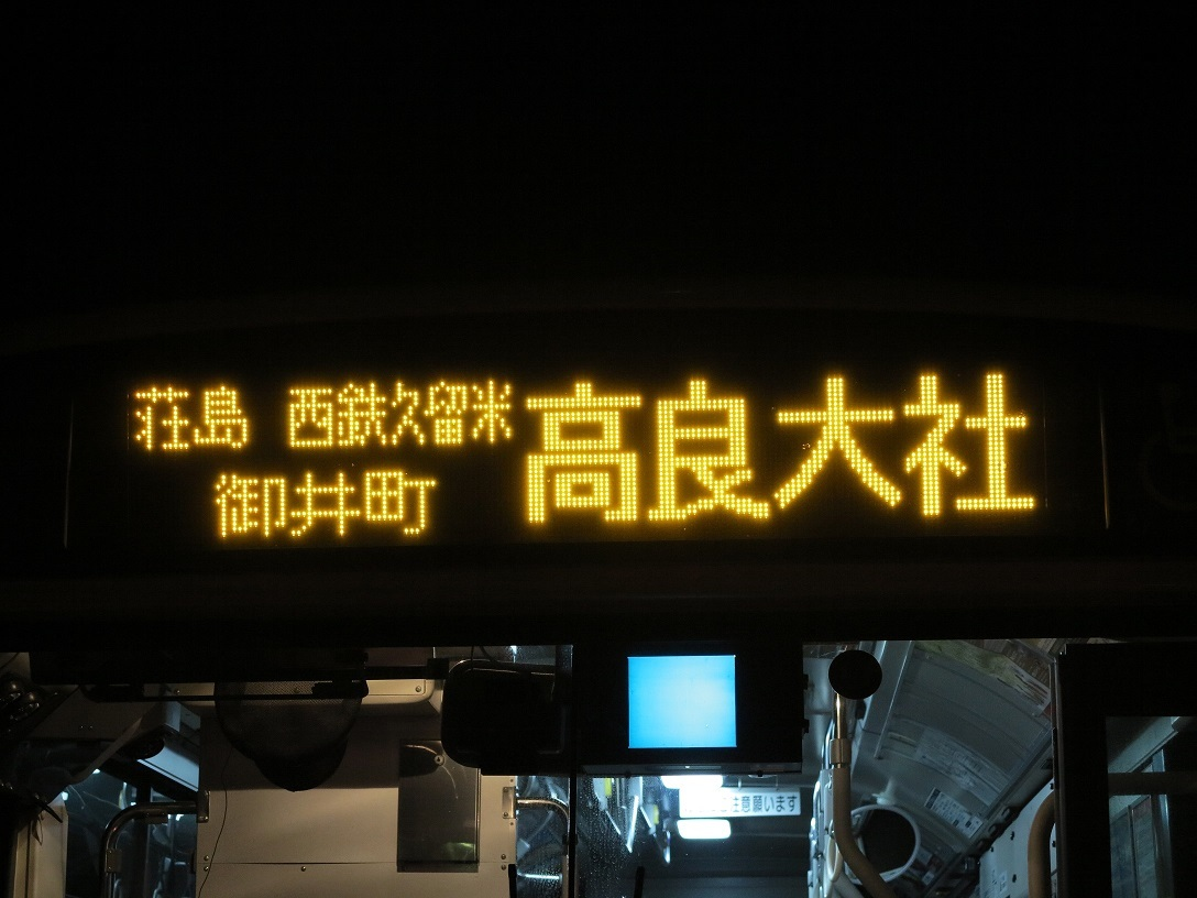 西鉄バス久留米 高良大社線の行先表示